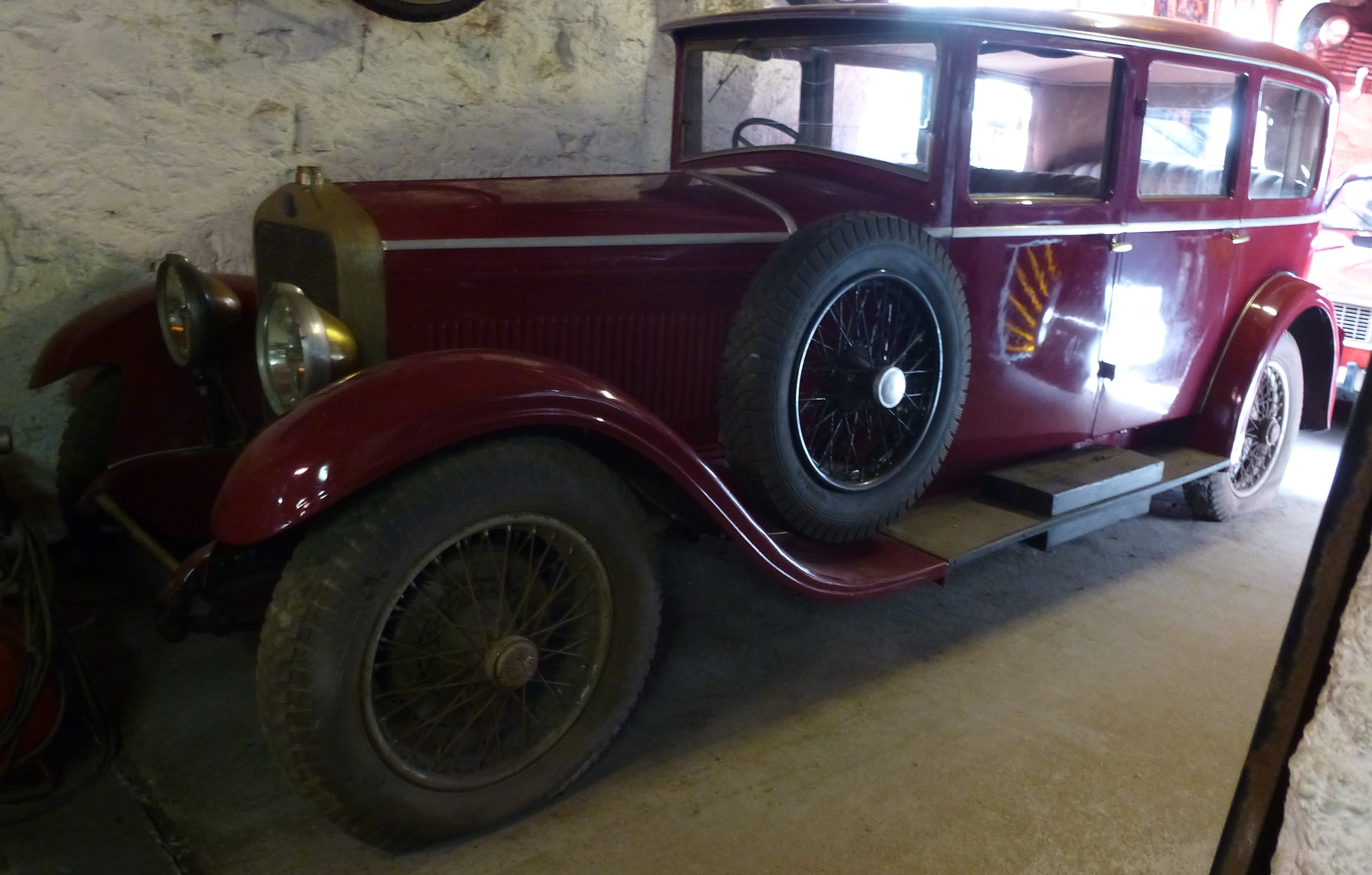 Delage Type DM 1928